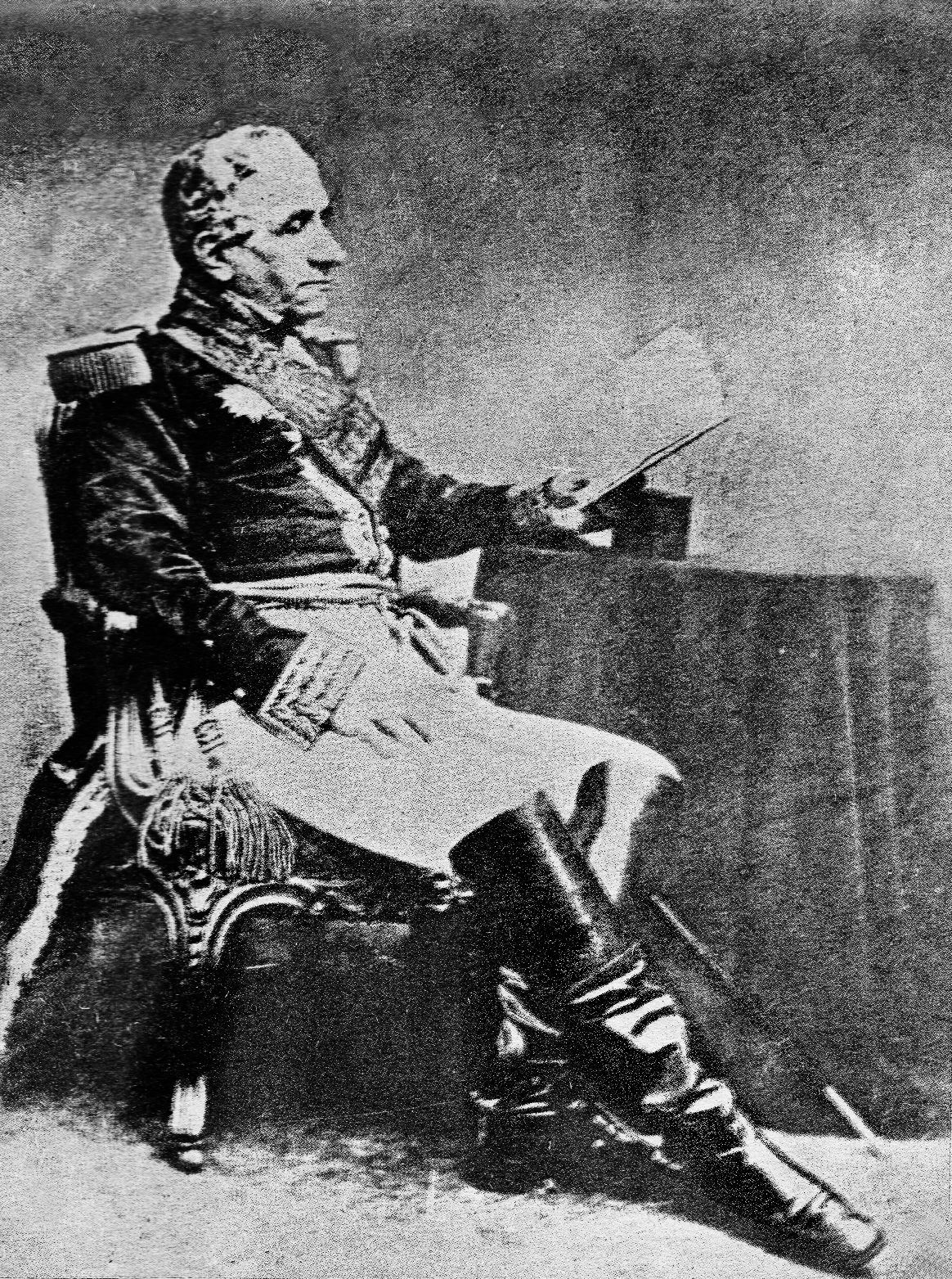 Andres de Santa Cruz